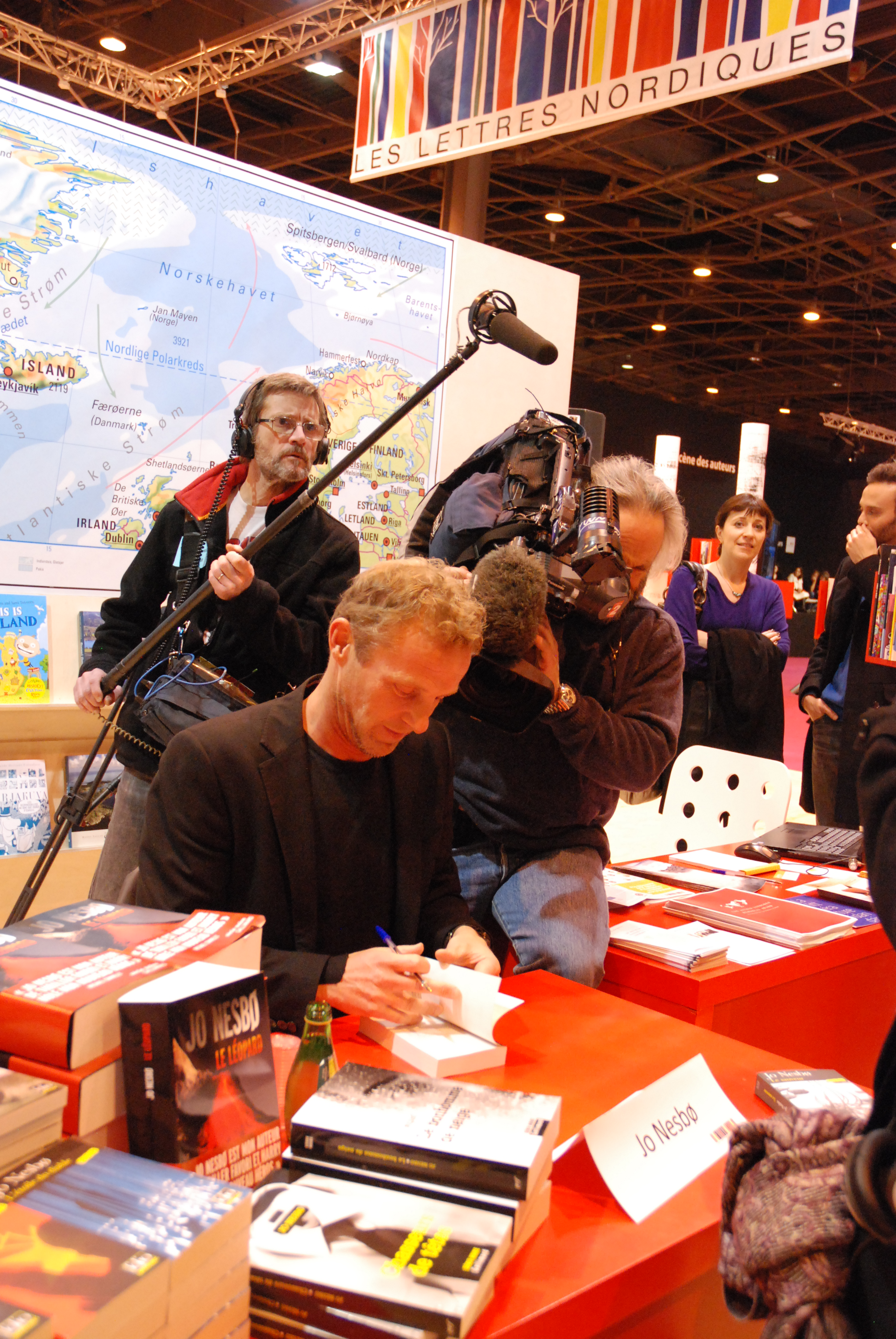 På den nordiske standen på den franske bokmessen i Paris.